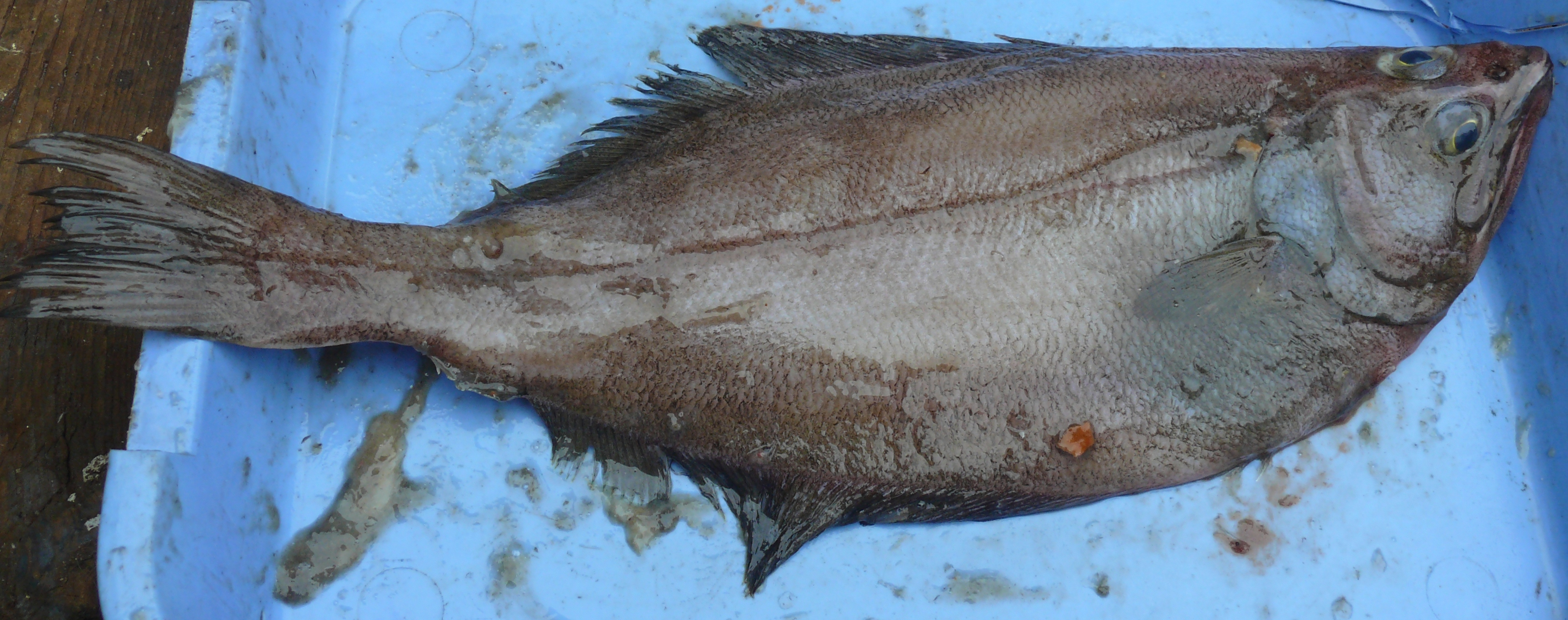 Азиатский стрелозубый палтус, зрячая сторона, пойман в районе южных Курильских островов, Южнокурильский пролив